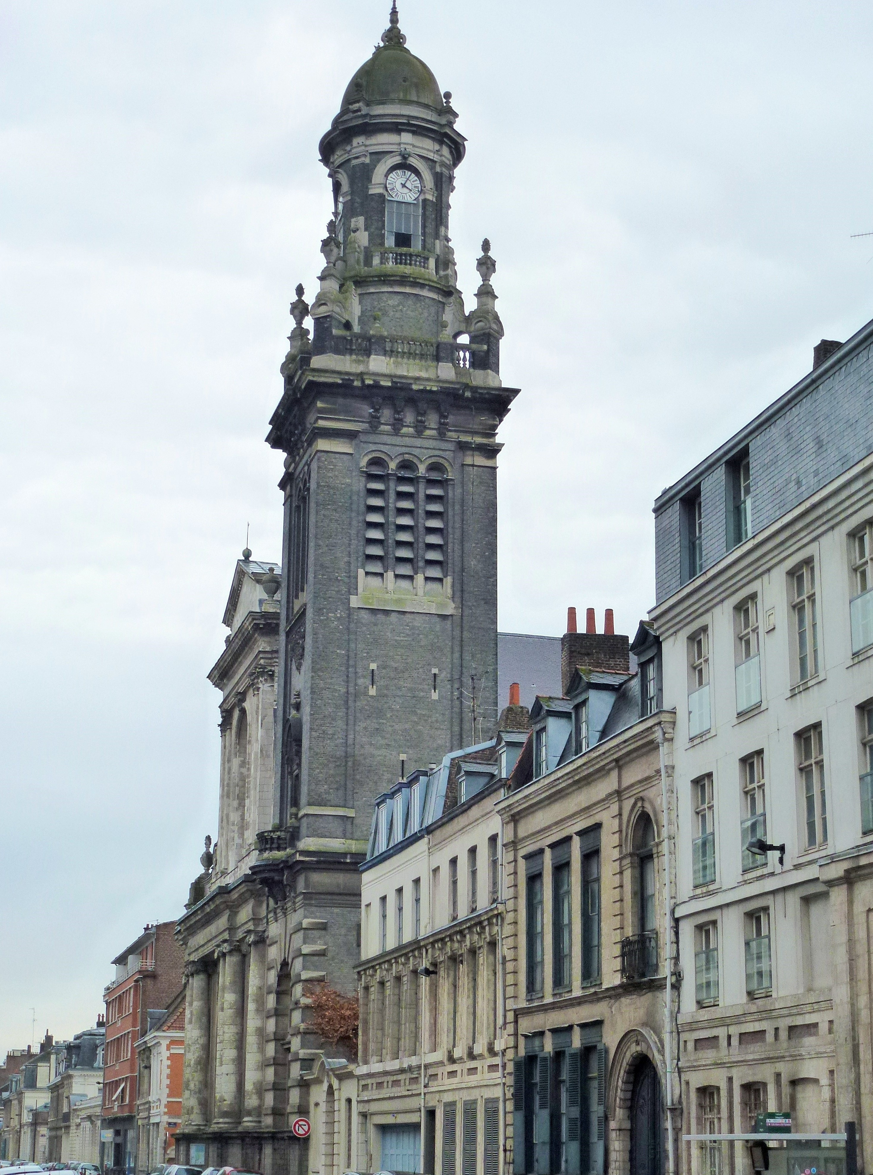 Église Saint-André de Lille Lille Nord (département français). .